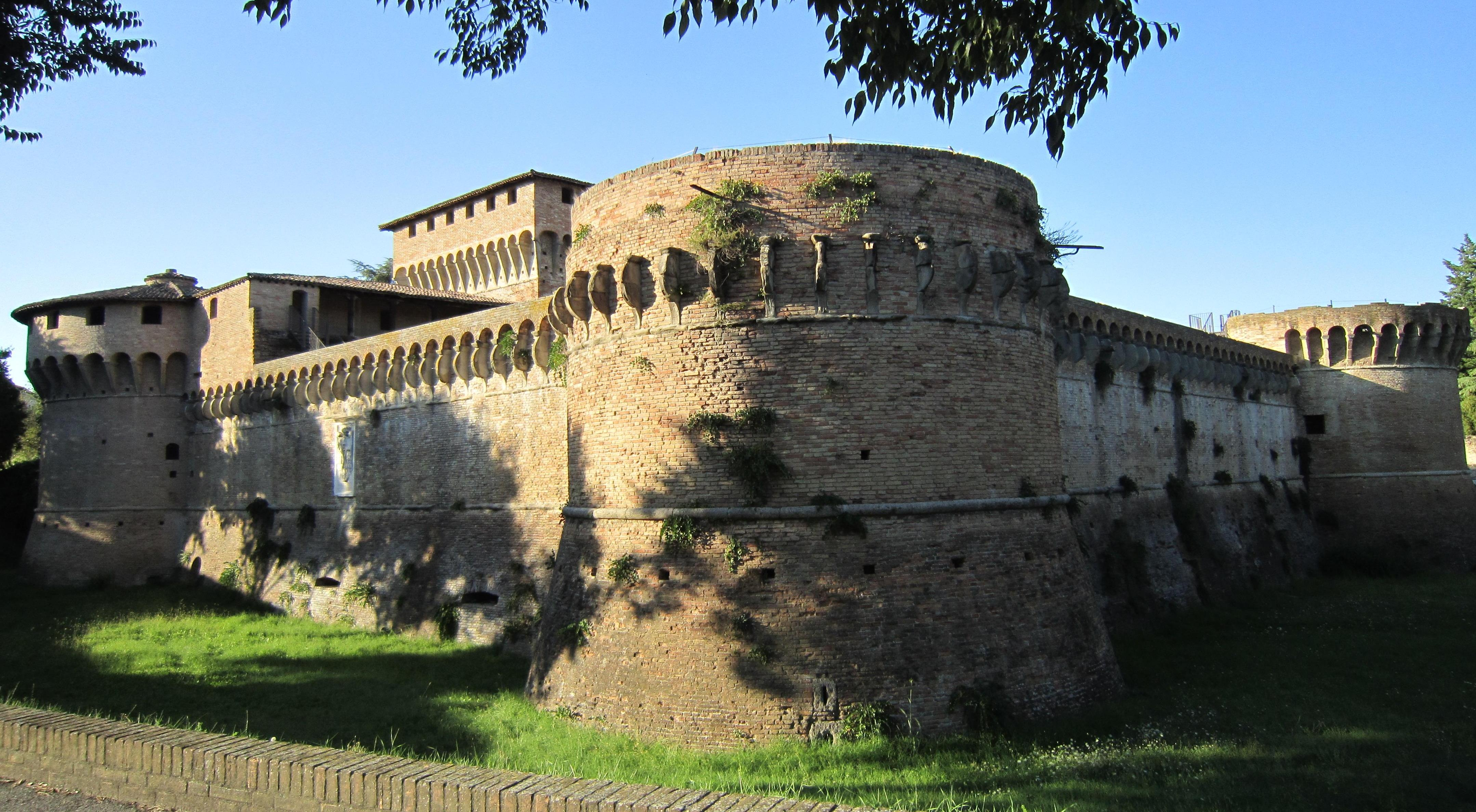 Фотография цитадели Равальдино